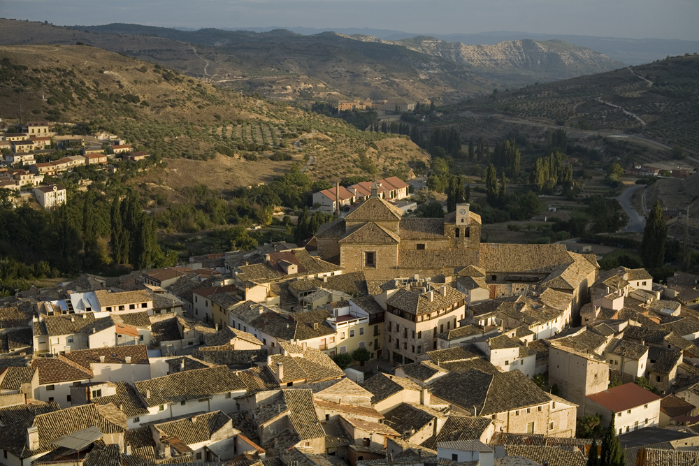 unidentified Spain